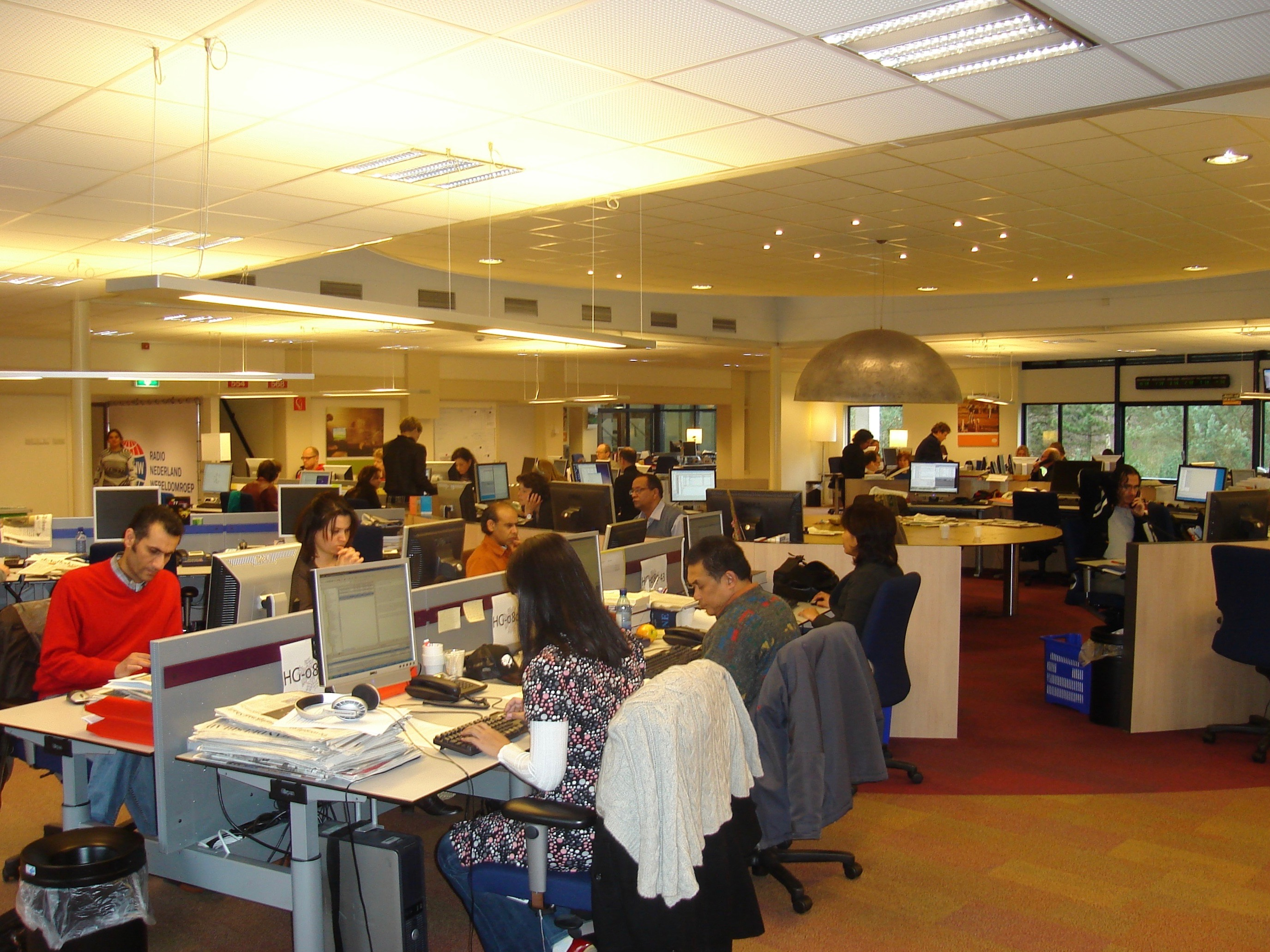 Radio Nederland Wereldomroep Inside داخل مبنى إذاعة هولندا العالمية